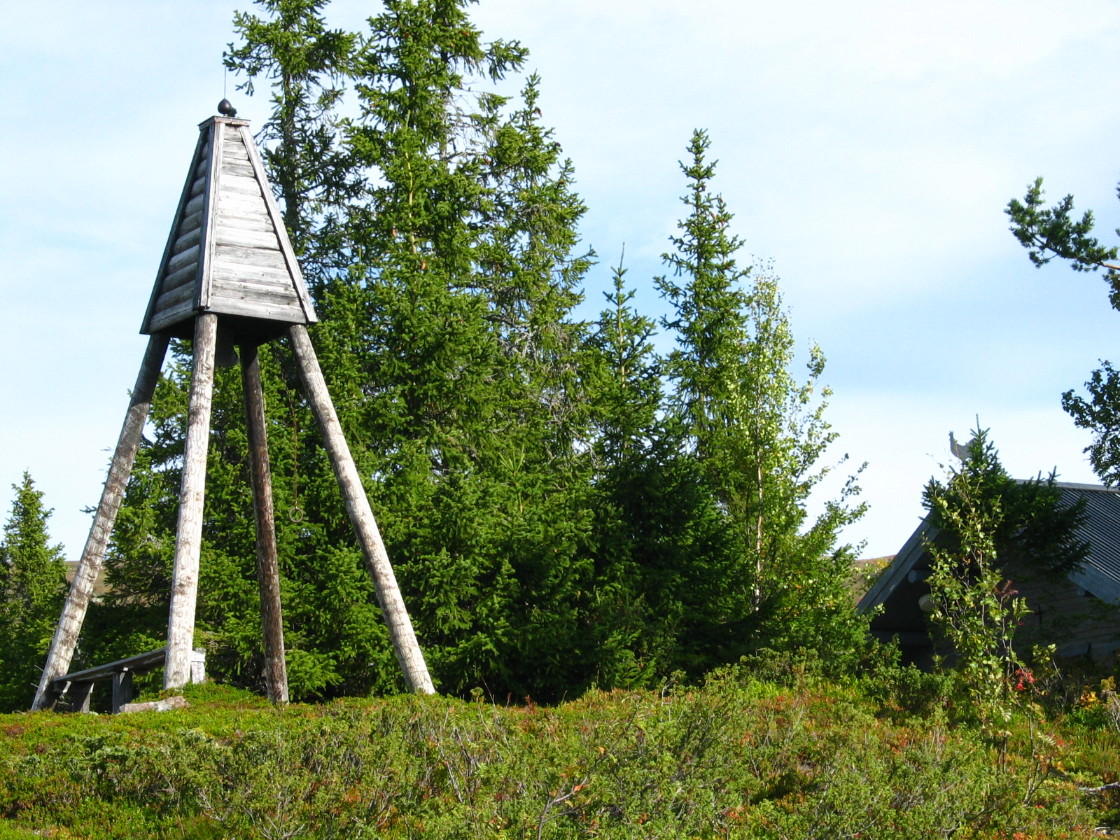 Klockstapel i Västra Arådalen